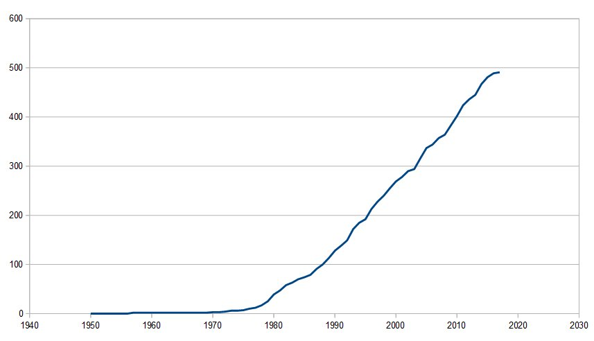 Przyrost liczby chwastów odpornych na herbicydy.